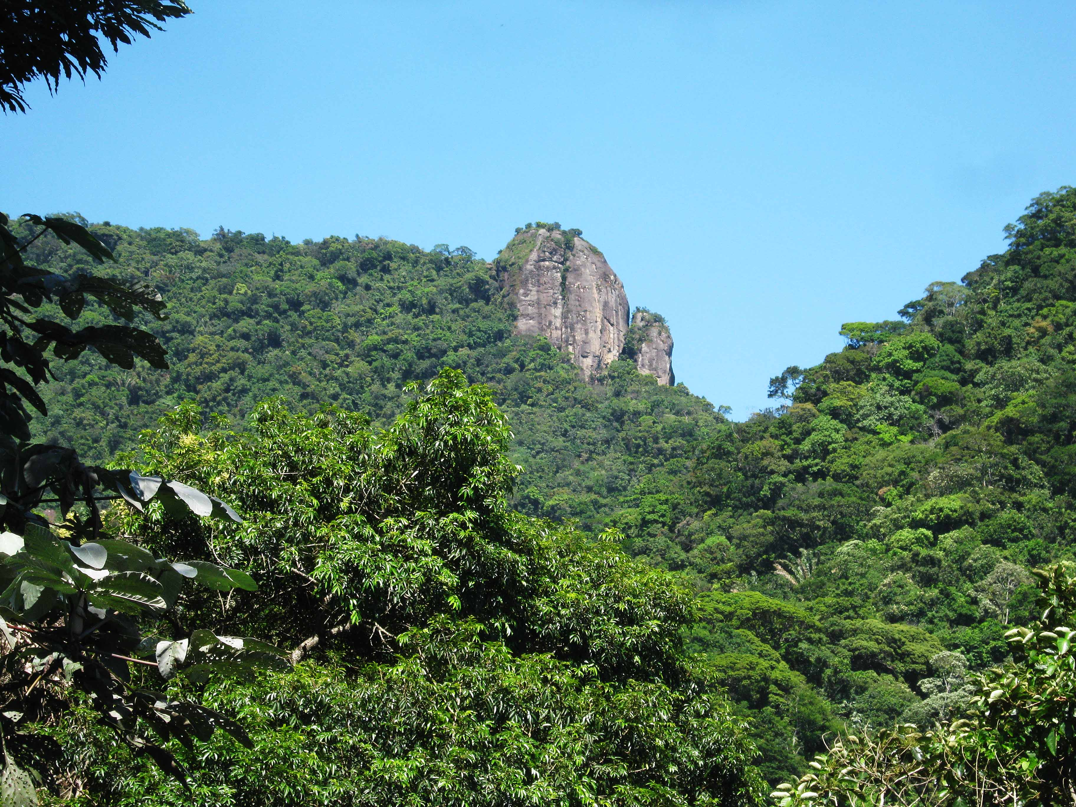 Floresta da Tijuca - Pico da Tijuca Mirim visto do Mirante do Excelsior